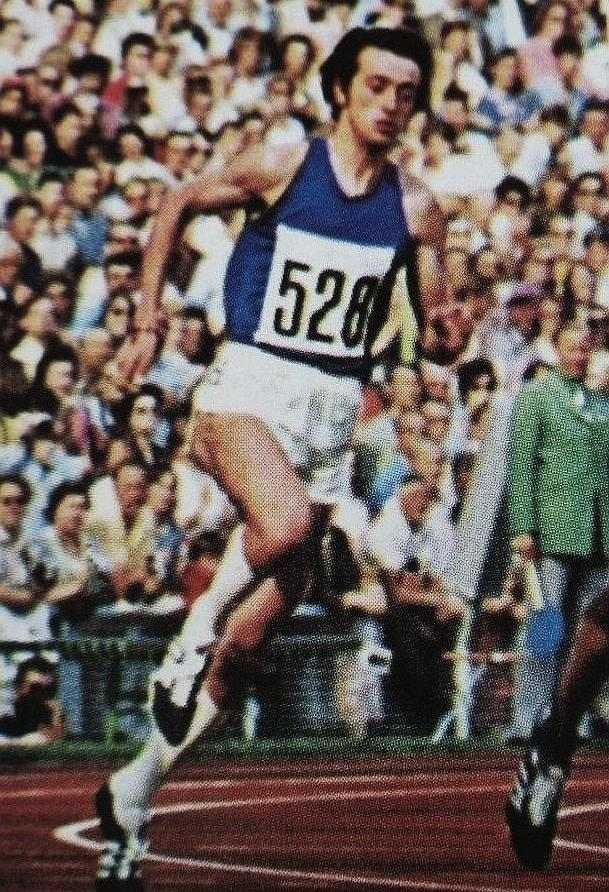 Pietro Mennea en 1973, 'Campioni dello Sport 1973 - 1974', Panini figurina n°11.